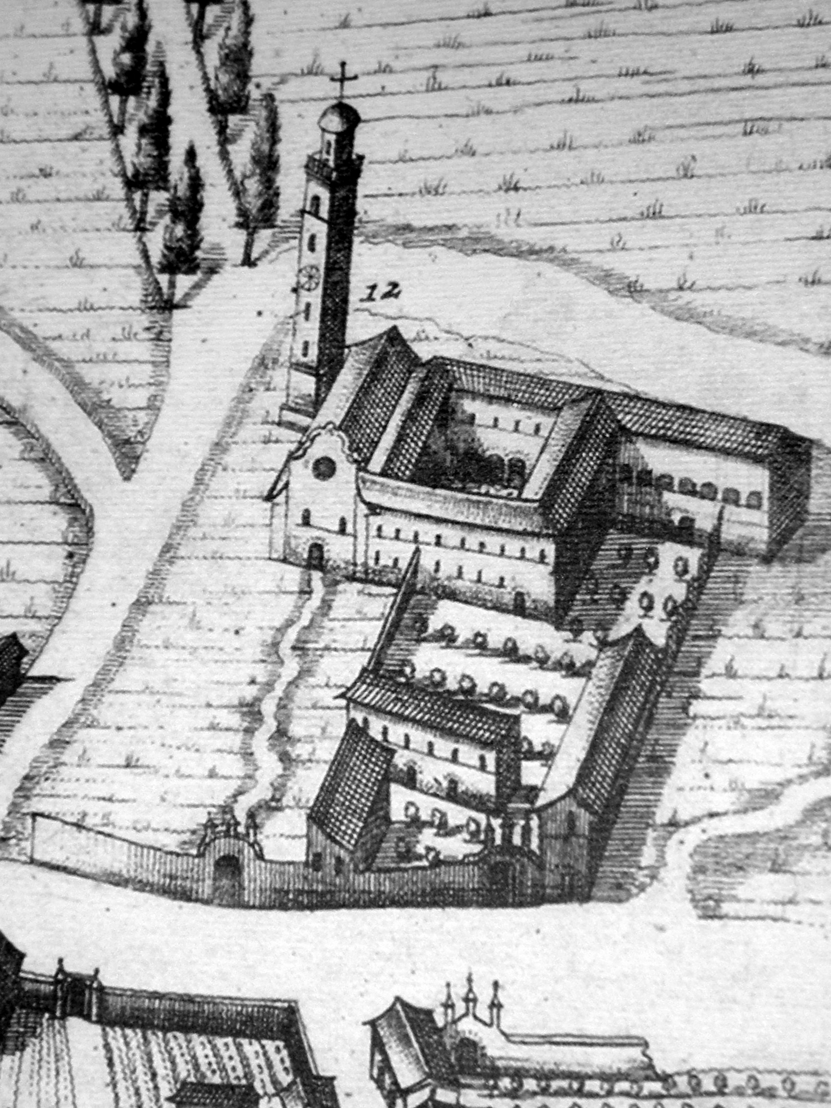 Pierre Mortier; antica mappa di Rovigo: dettaglio, il complesso della chiesa di San Bortolo (Bartolomeo) e del convento degli Olivetani.